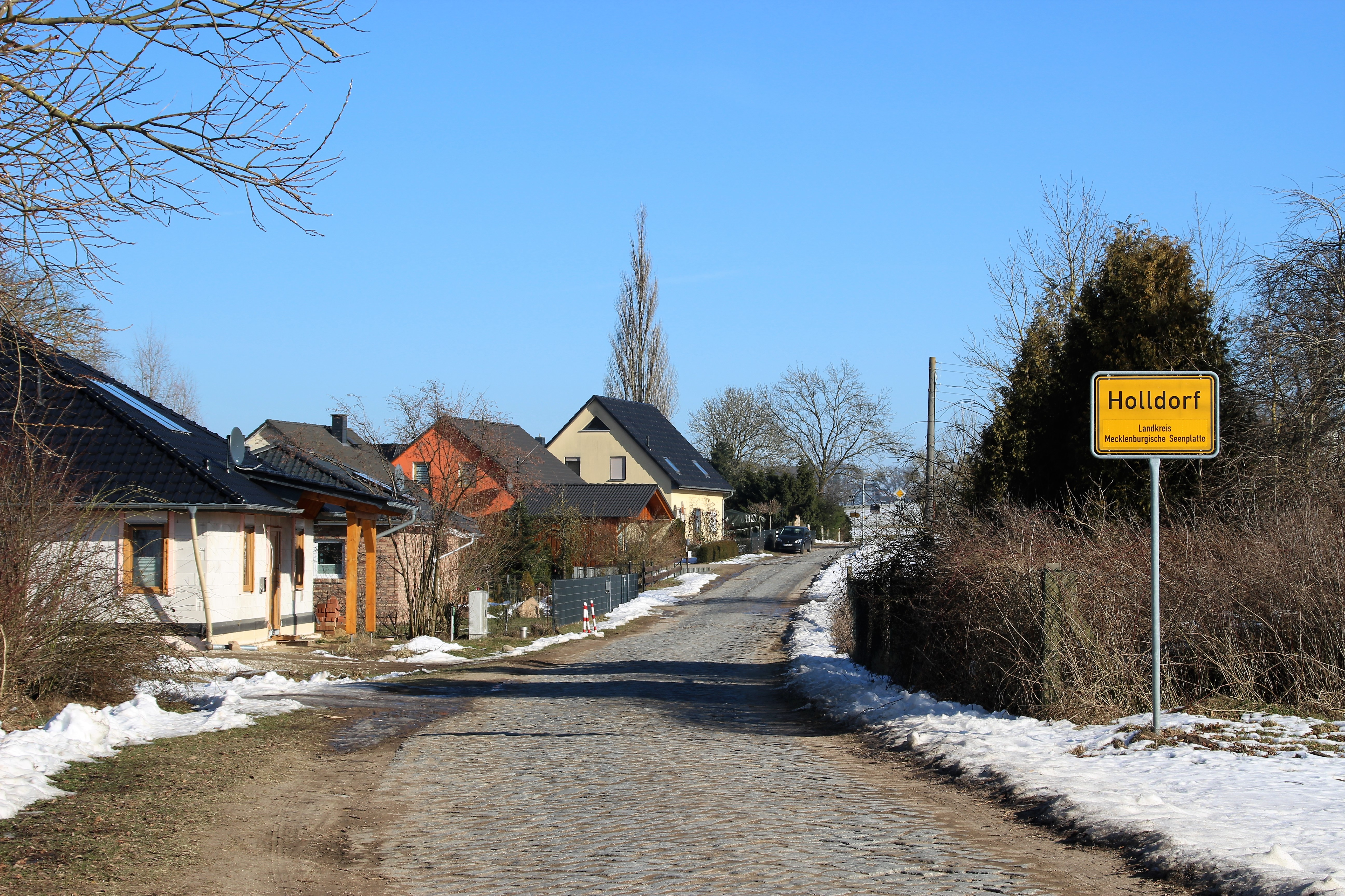 Südwestlicher Ortseingang